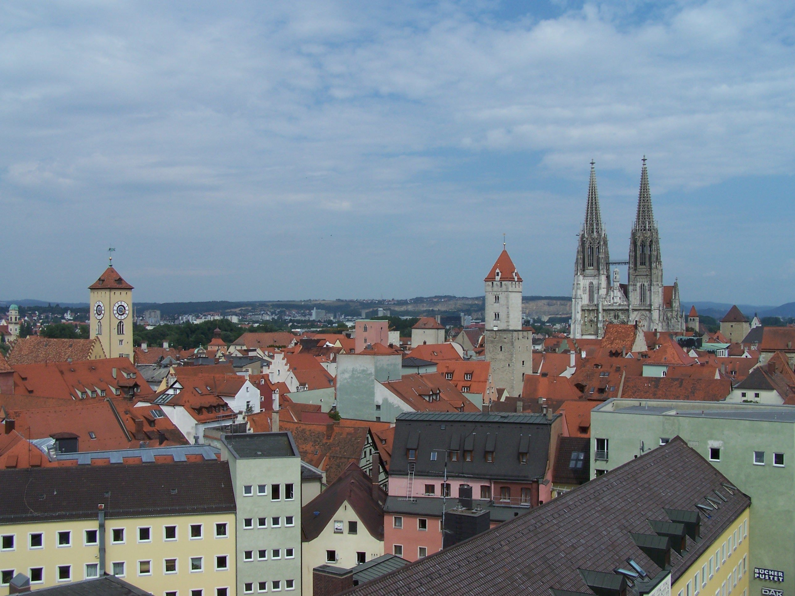 Regensburg; city center, view from the Dreieinigkeits-Church